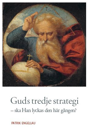 Bokomslag